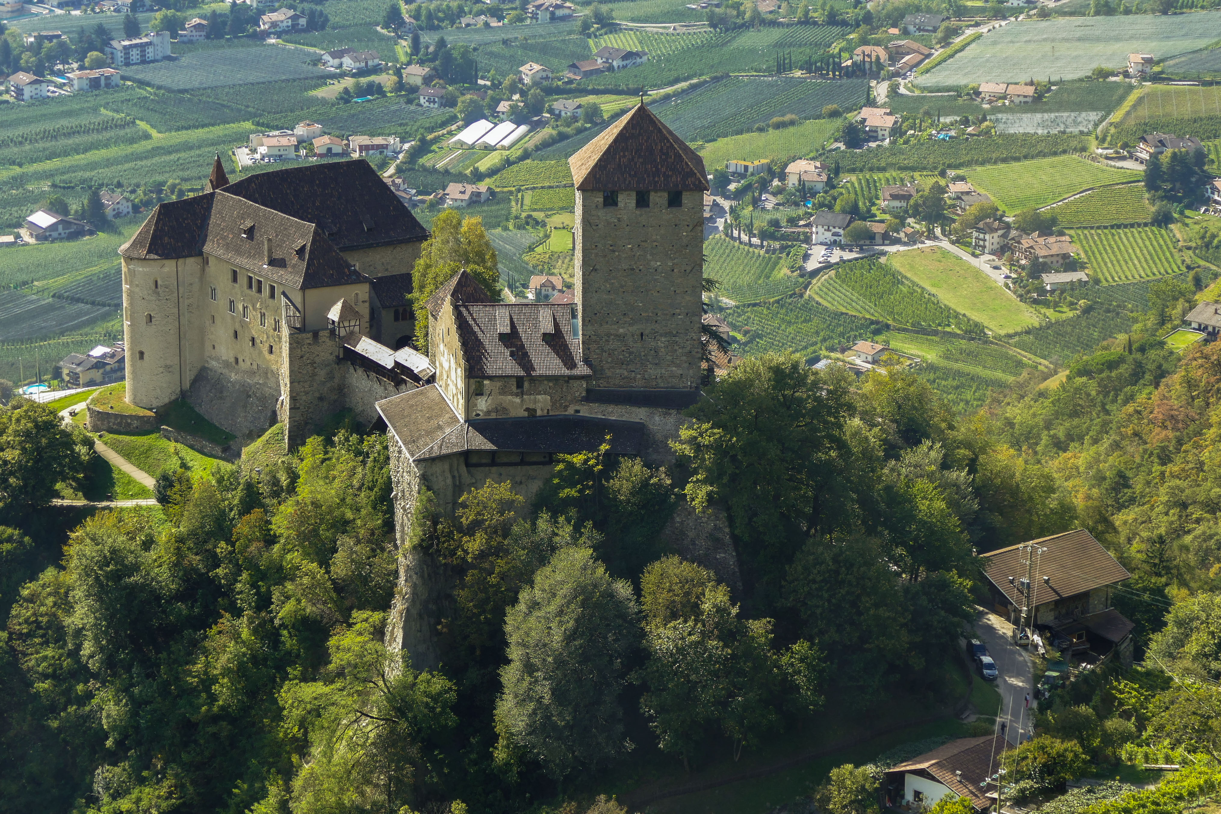 Schloss Tirol vom oberen Bereich des Dorfes Tirol aus gesehen